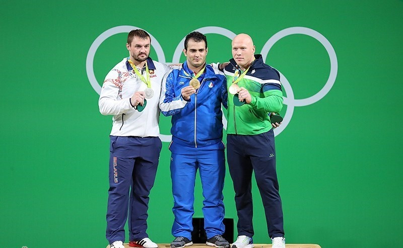 وزنه‌برداری در بازی‌های المپیک تابستانی ۲۰۱۶ – ۹۴ کیلوگرم مردان